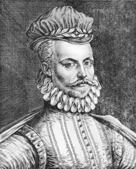 Jan van der Noot